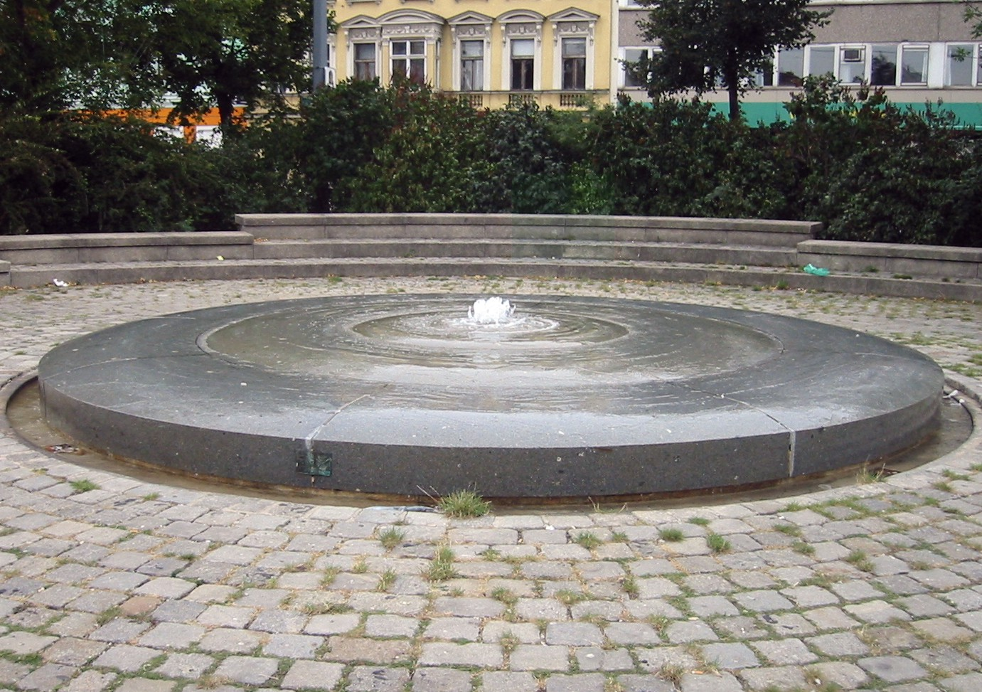 Wien, Stempel-Brunnen am Bruno-Pittermann-Platz